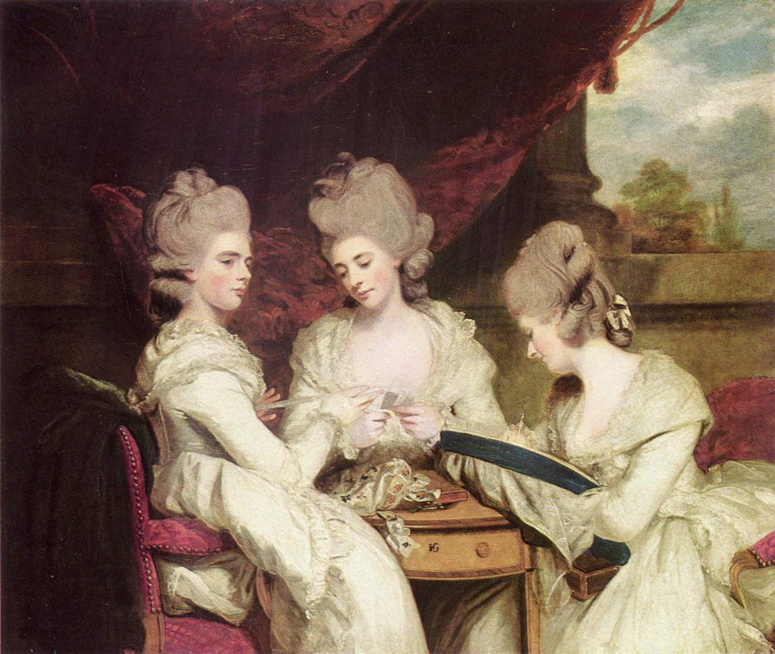 Die Schwestern Waldegrave